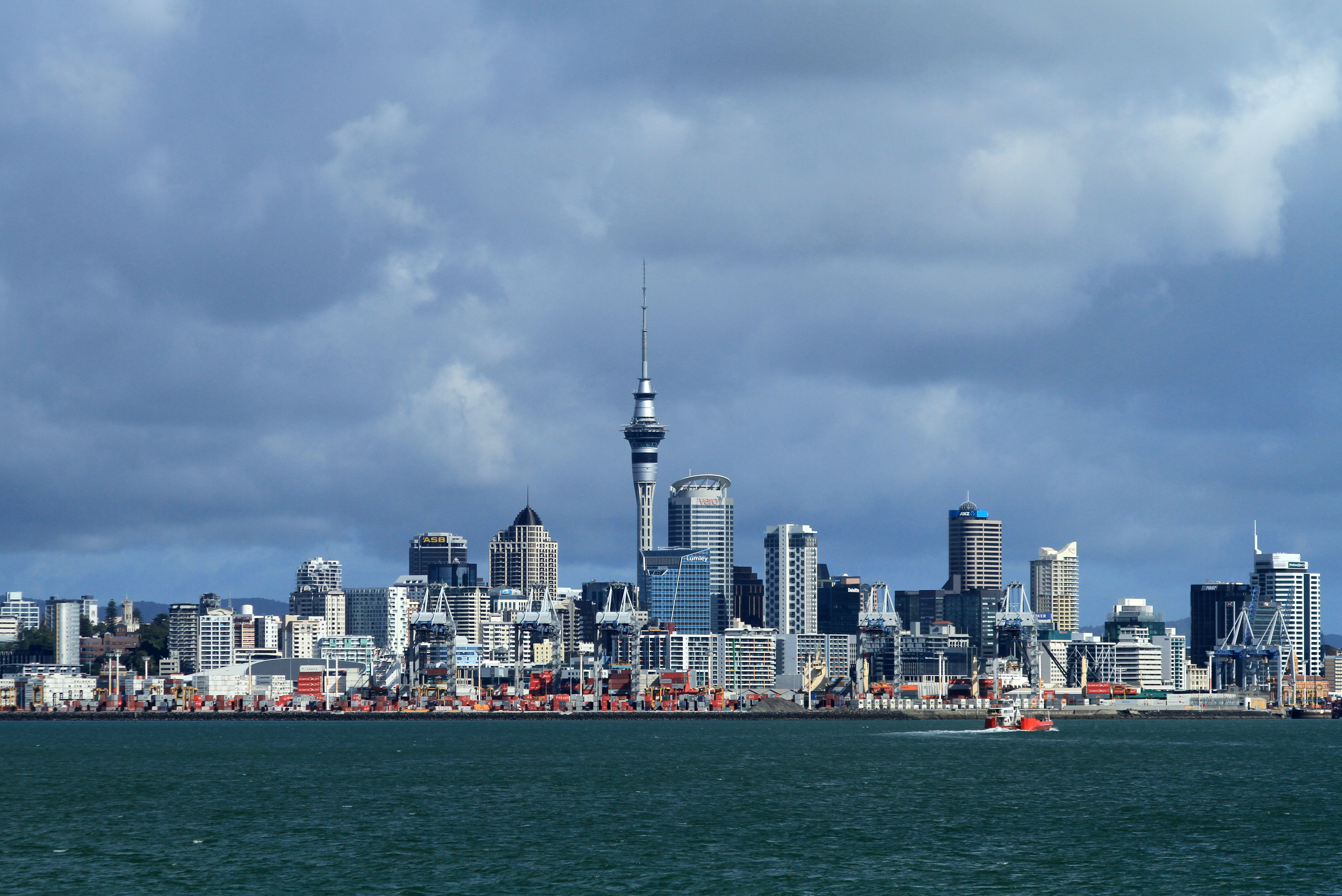 Auckland Harbour View 08